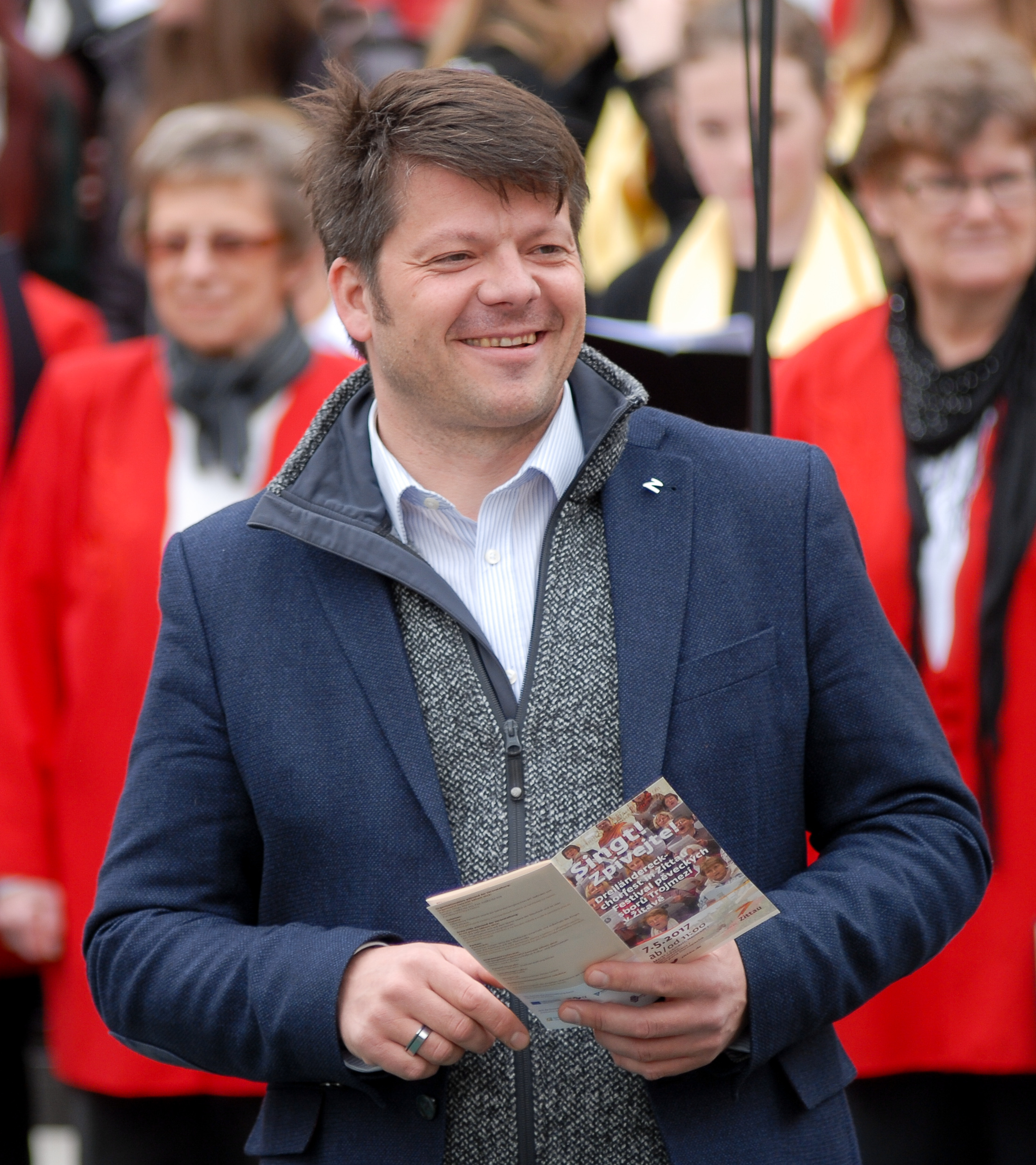 Thomas Zenker bei der Eröffnung des 1. Dreiländereckchorfestes auf dem Zittauer Marktplatz.